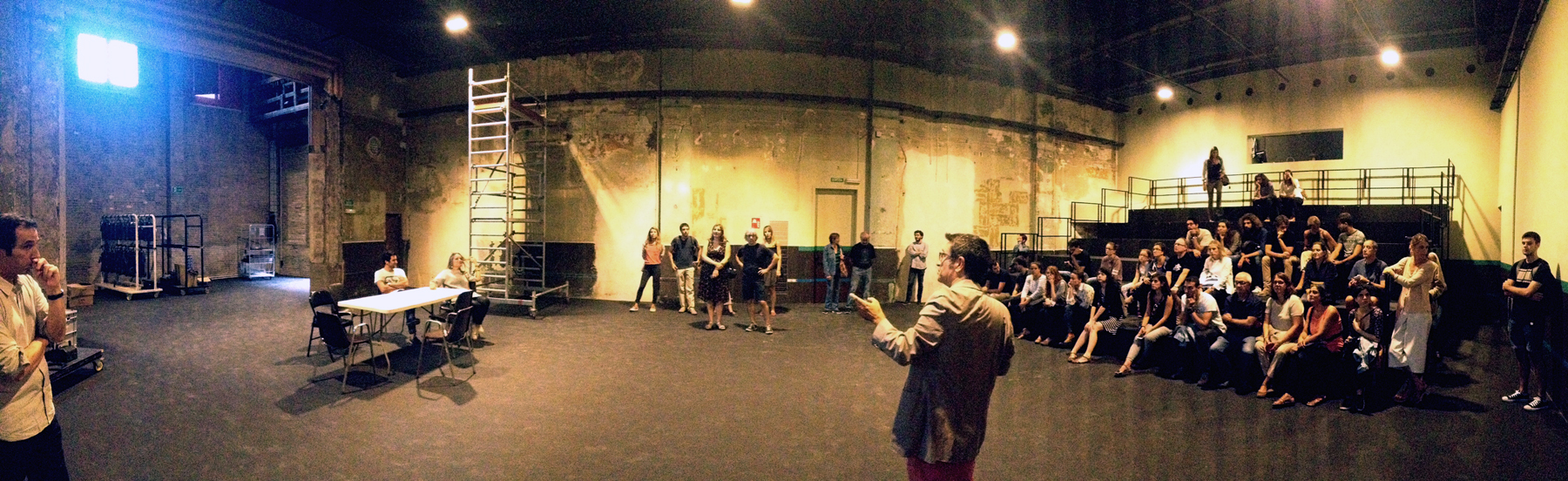 Sala superior secundaria de la Sala Beckett en el barrio de Pueblonuevo.